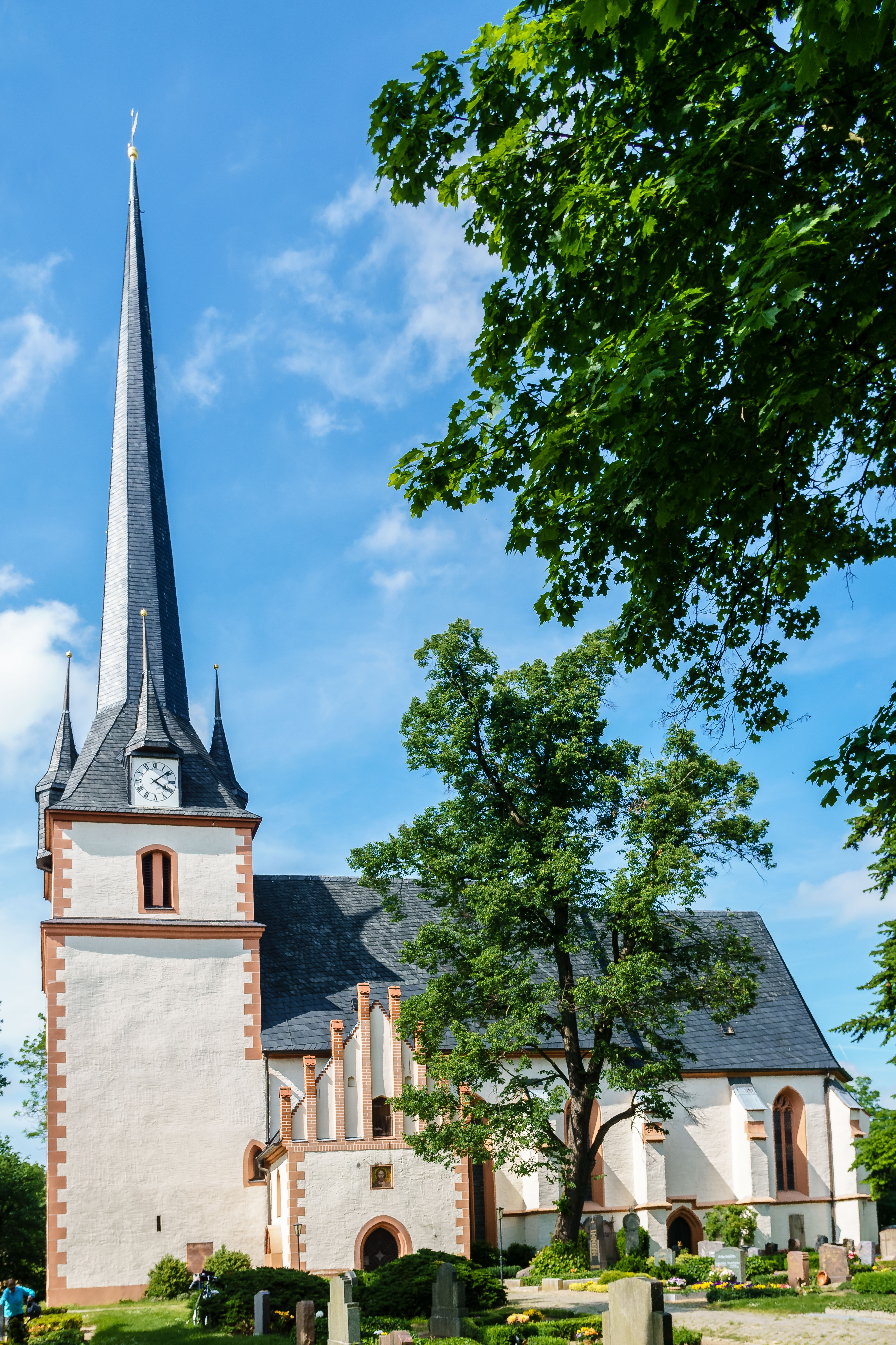 Kirche, Buchenwalder Straße in Rackwitz OT Podelwitz